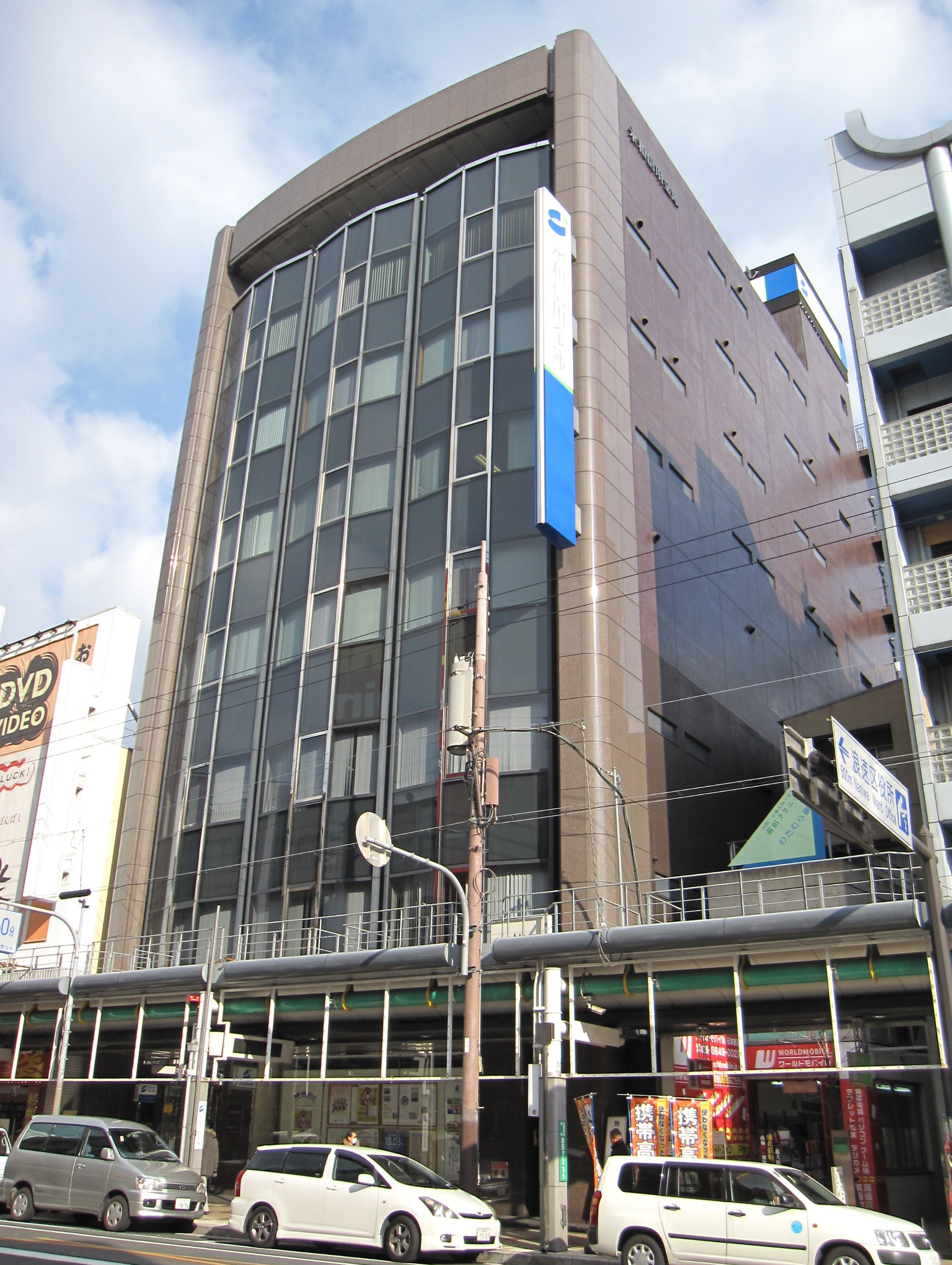 永和信用金庫